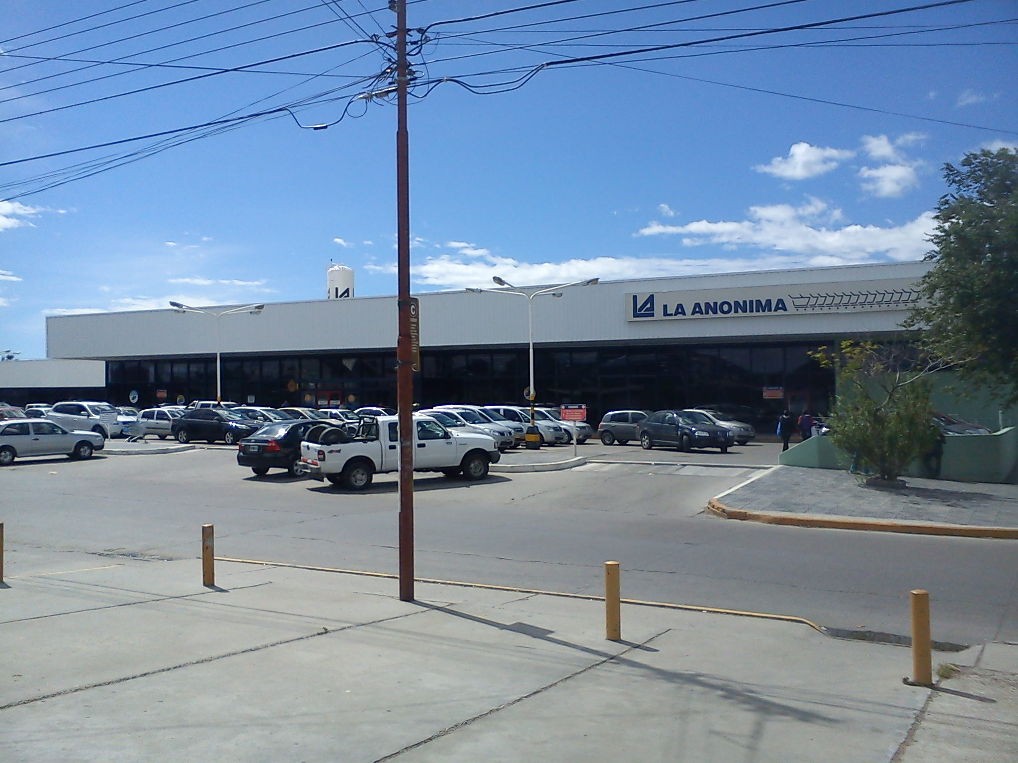 sucursal 31 de la anonima